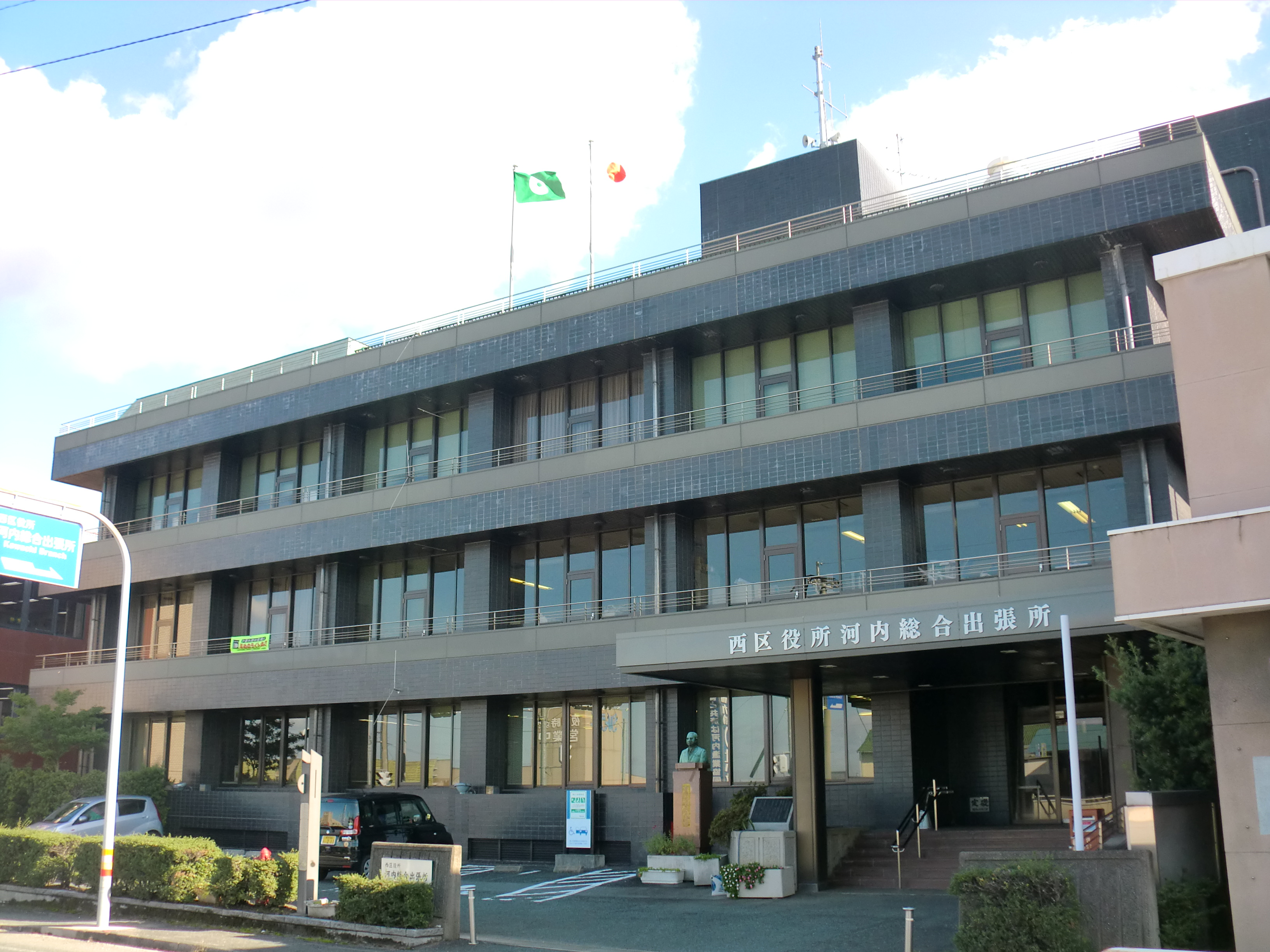 熊本市西区にある西区役所河内総合出張所